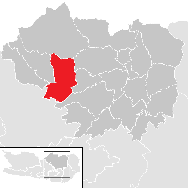 Bezirk Sankt Veit an der Glan